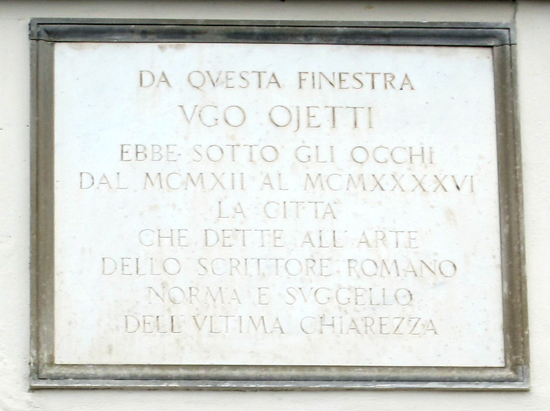 Villa il salviatino, finestra di ugo ojetti, lapide